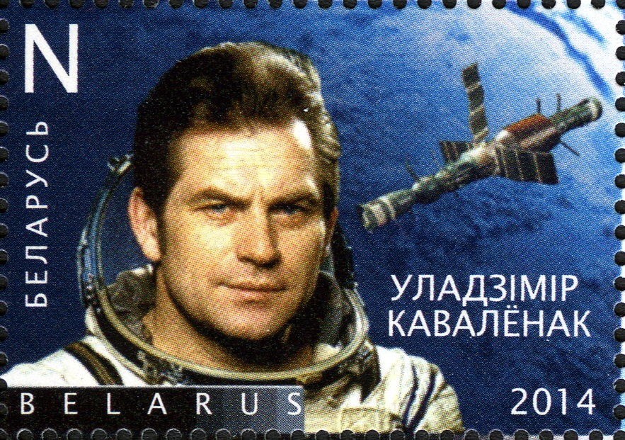 Паштовая марка Беларусі "Заваёўнікі космасу, ураджэнцы Беларусі"